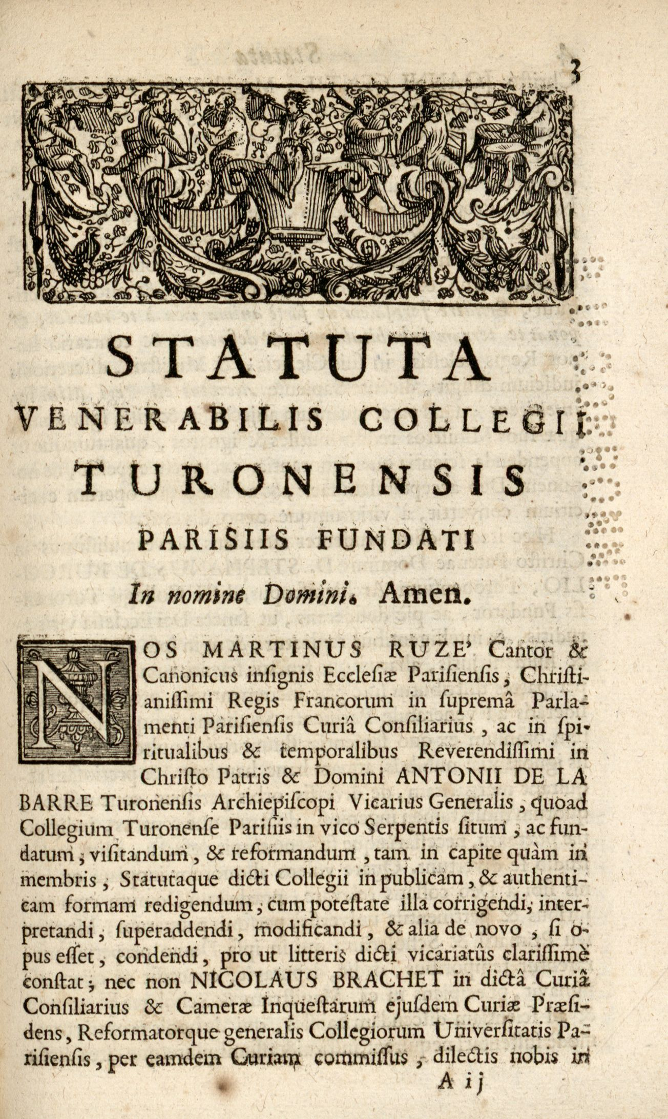 Monographie imprimée en latin, dans un recueil de 17 pièces imprimées.